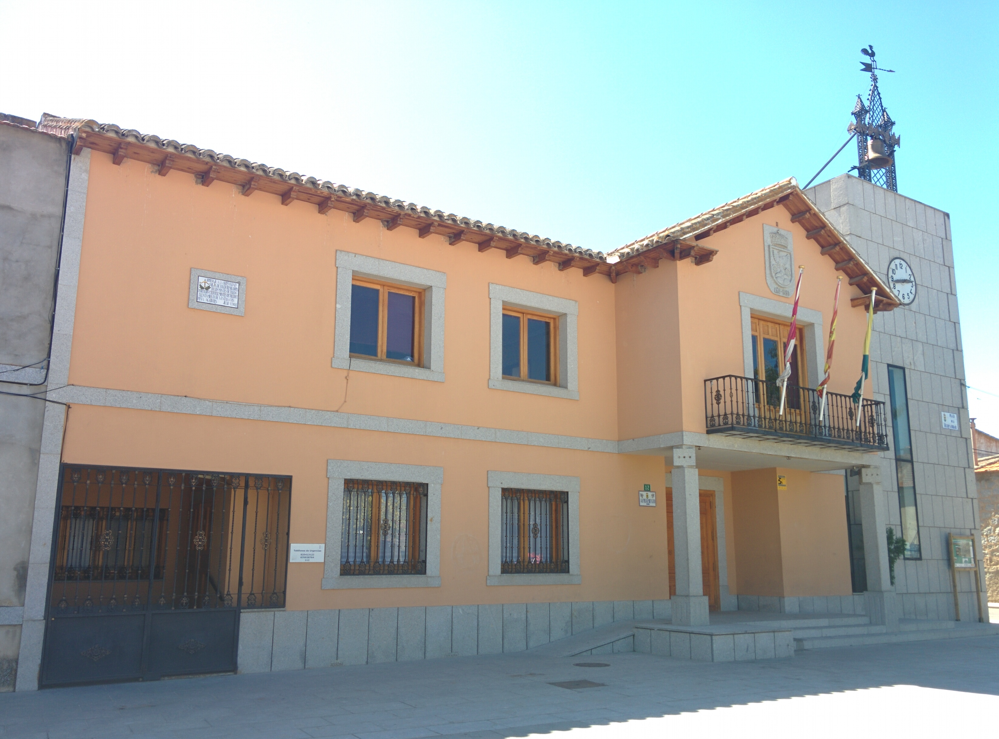 Casa consistorial de Las Ventas con Peña Aguilera (Toledo, España).